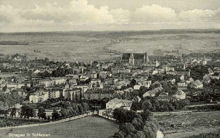 Striegau, Niederschlesien: Postkarte um 1930 (now in Poland)